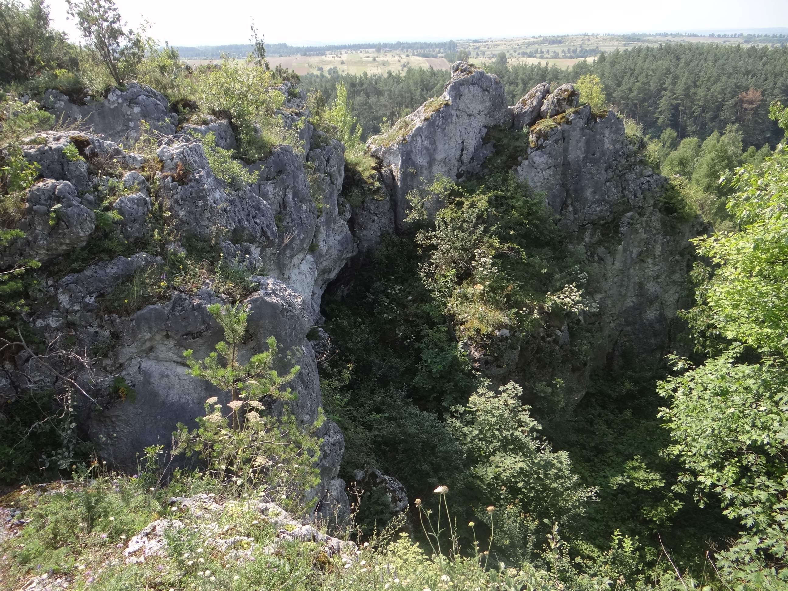 Duże Rajce w Przewodziszowicach